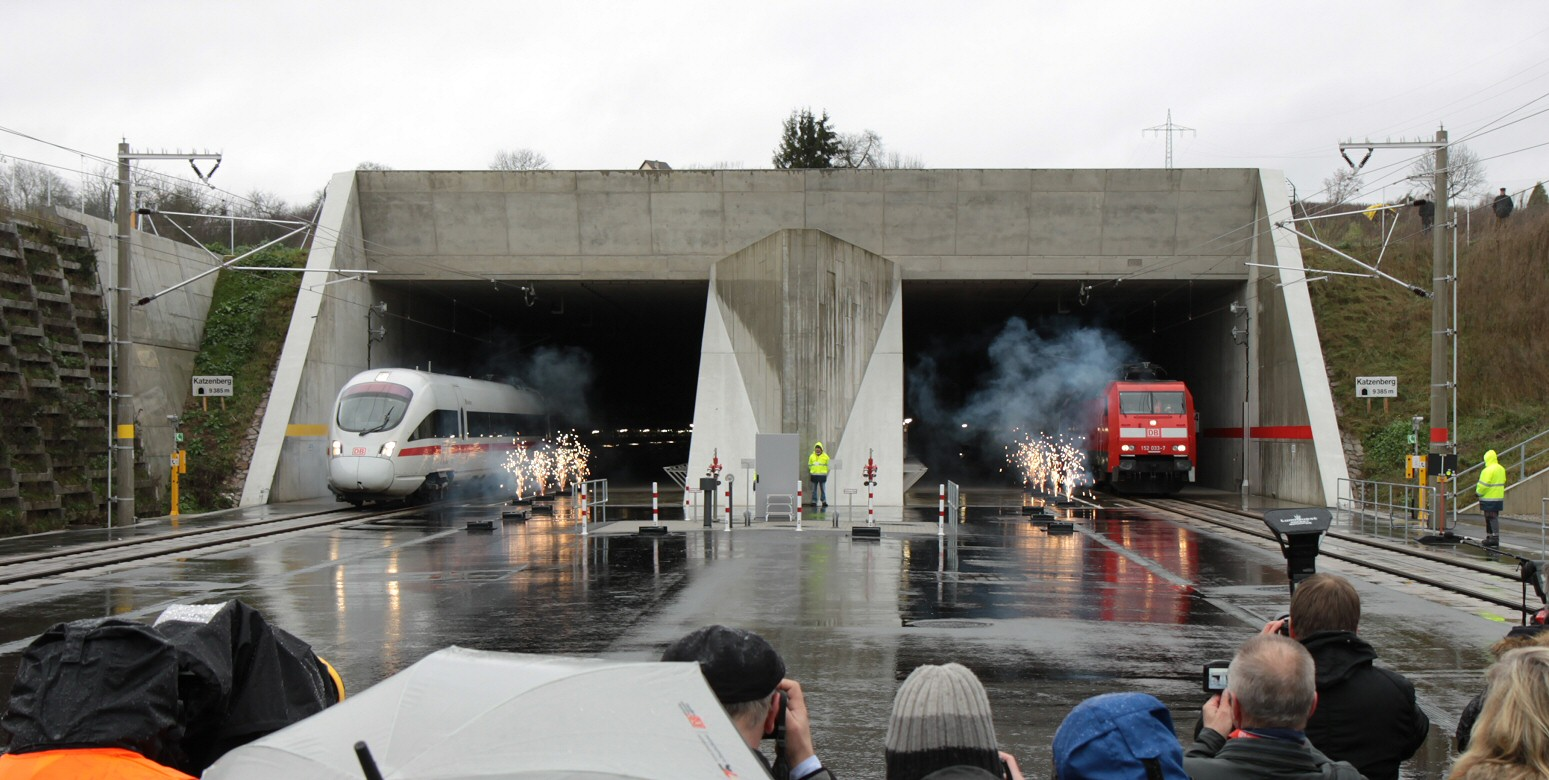 Die ersten beiden Züge durchfahren nach dessen Inbetriebnahme den Katzenbergtunnel (Baden-Württemberg, Deutschland).